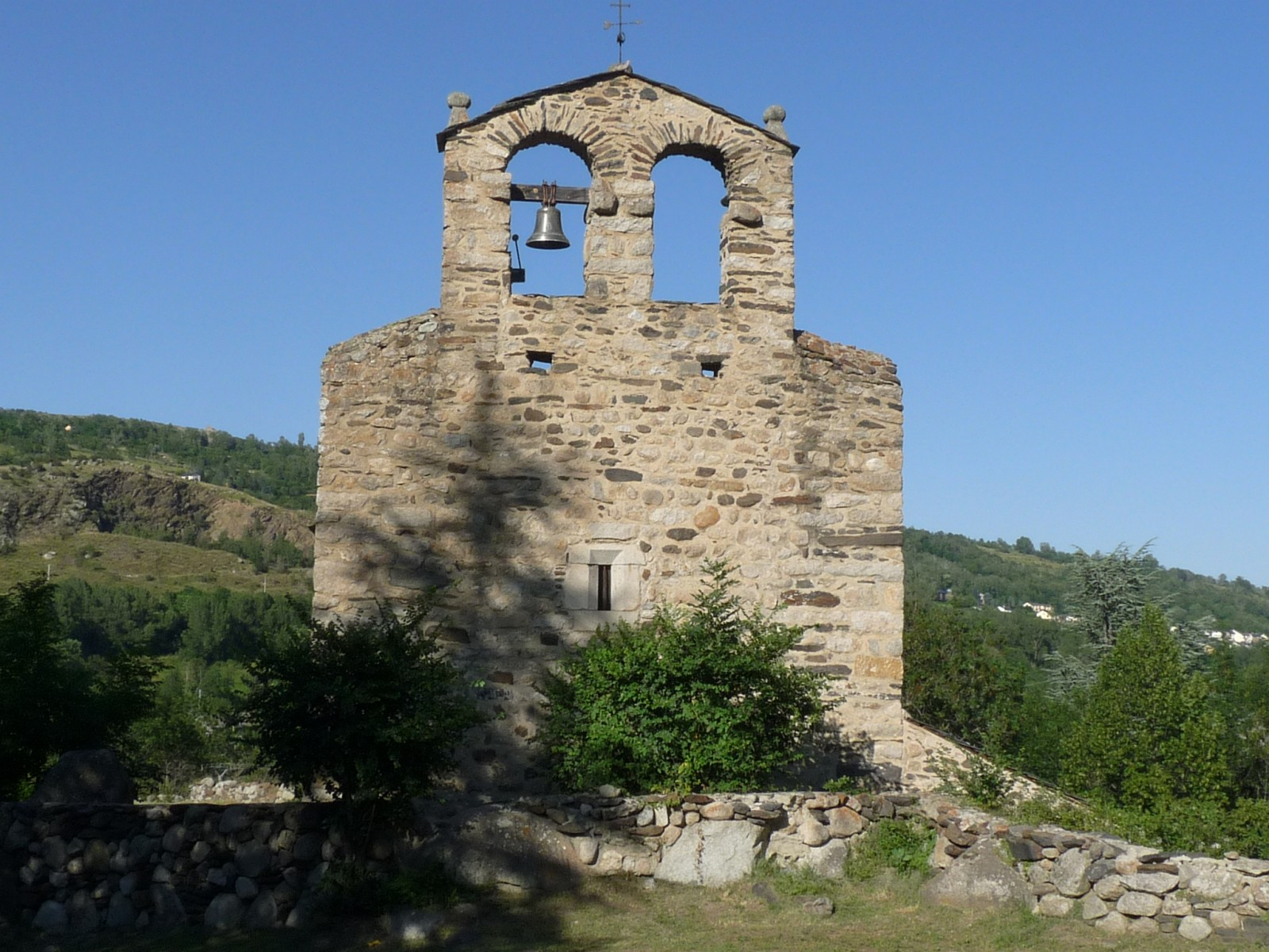 Chapelle d'Iravals, Latour-de-Carol, Pyrénées-Orientales, France